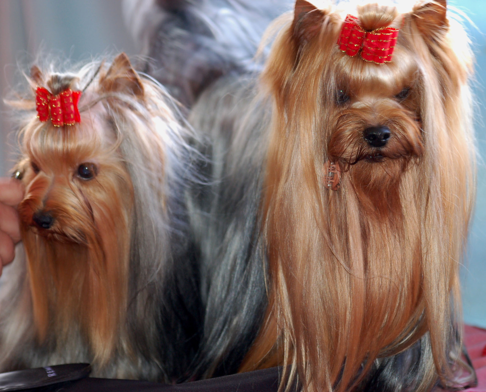 Yorkshire_teriery